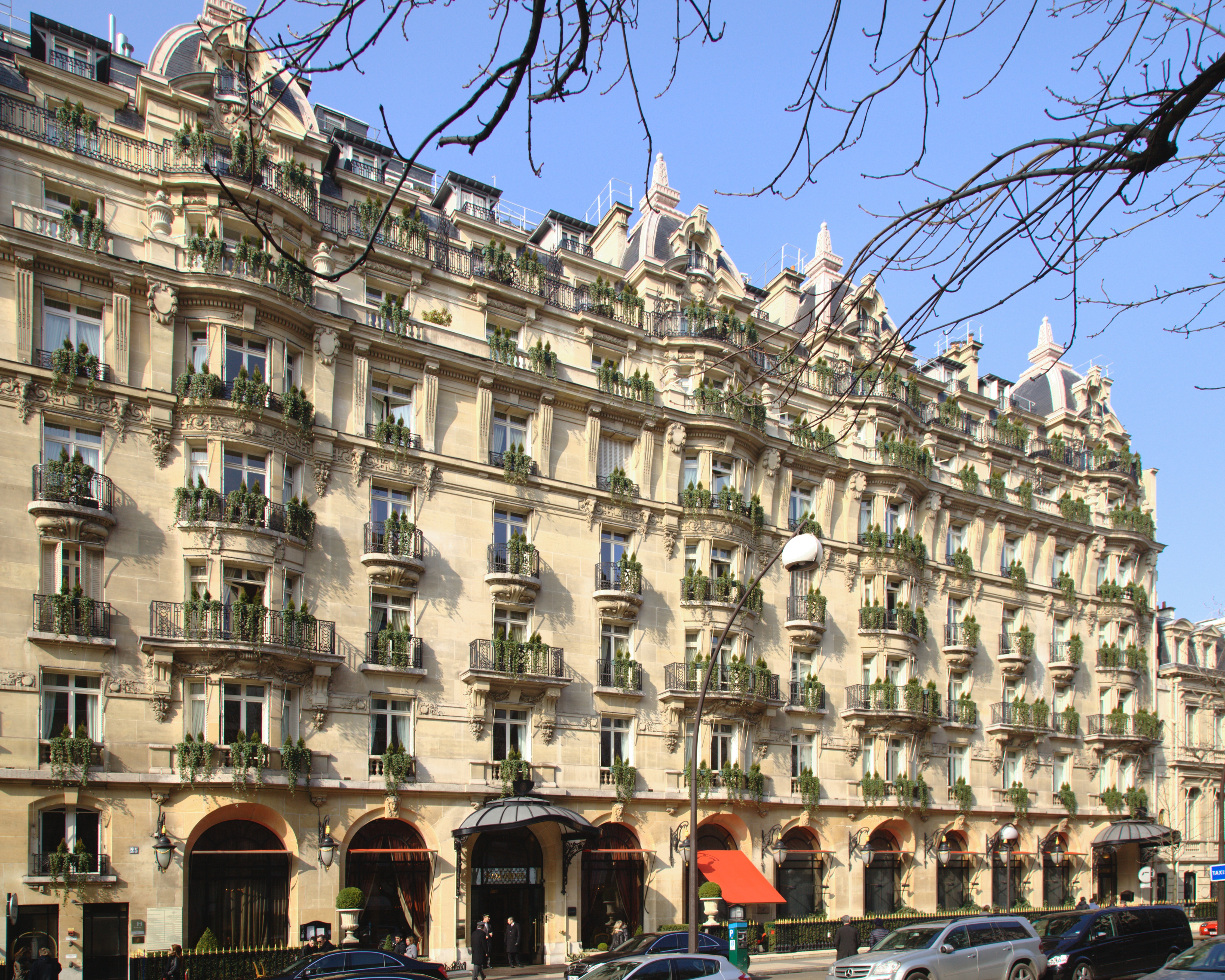 Hôtel Plaza Athena, avenue Montaigne, Paris